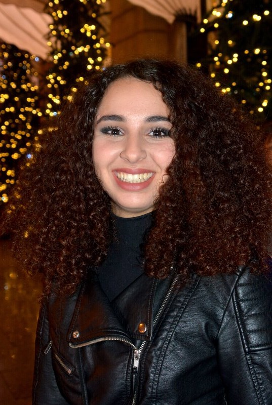 Baya Medhaffar au dîner des révélations des César du cinéma